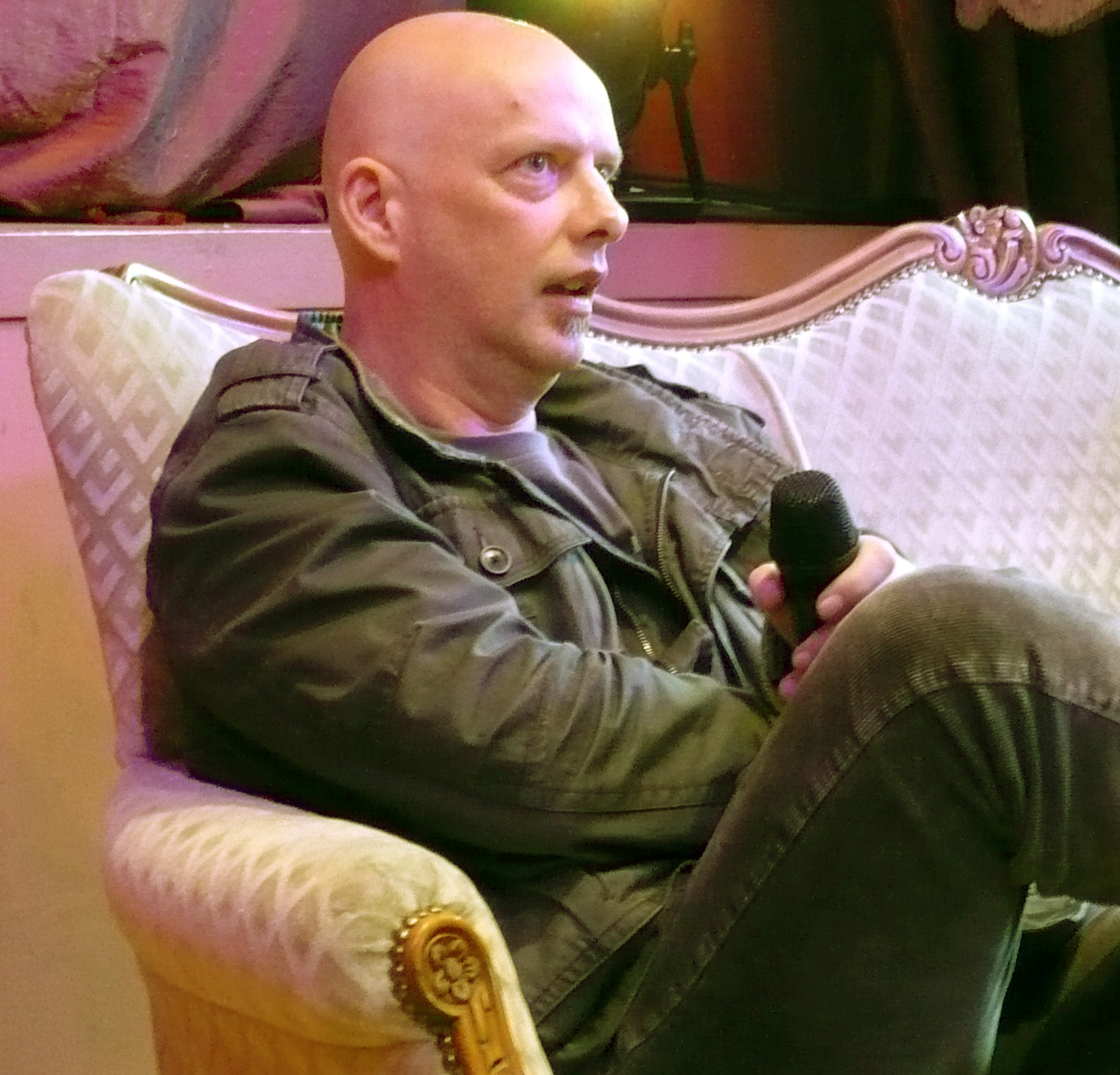 Hubert Klimko-Dobrzaniecki